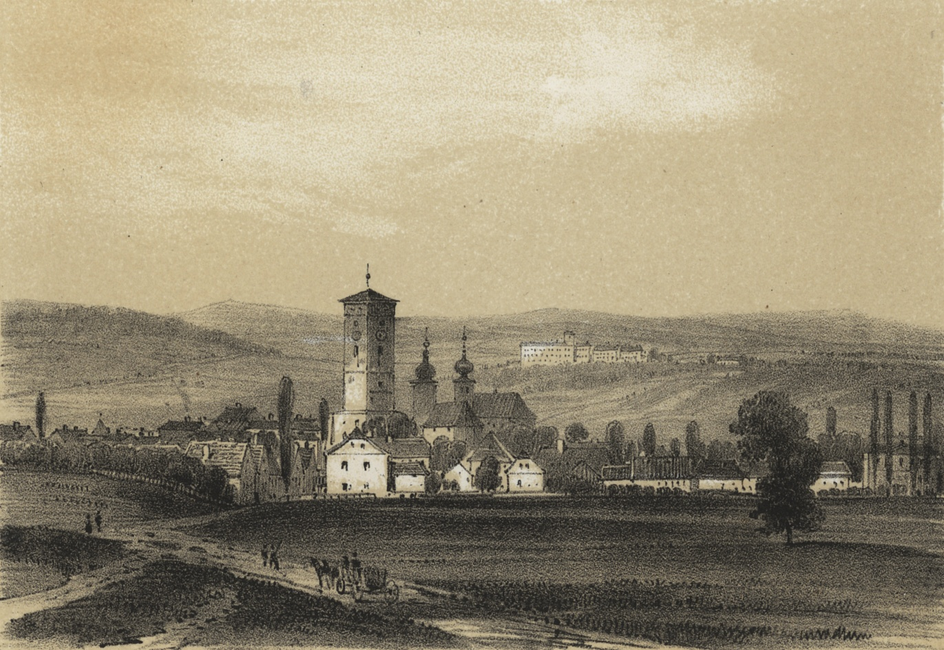 Mohelnice